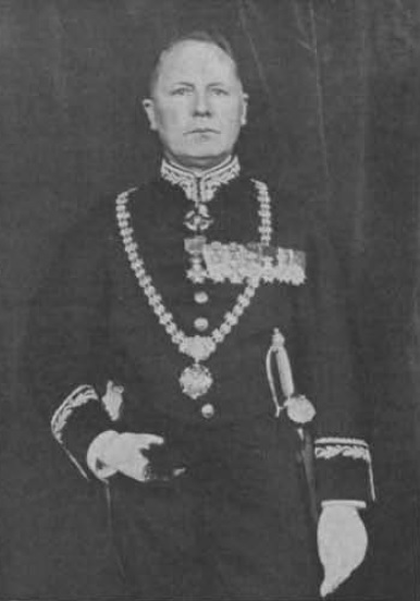 Gerhard Abraham Willem ter Pelkwijk 1882-1964, mayor of Utrecht